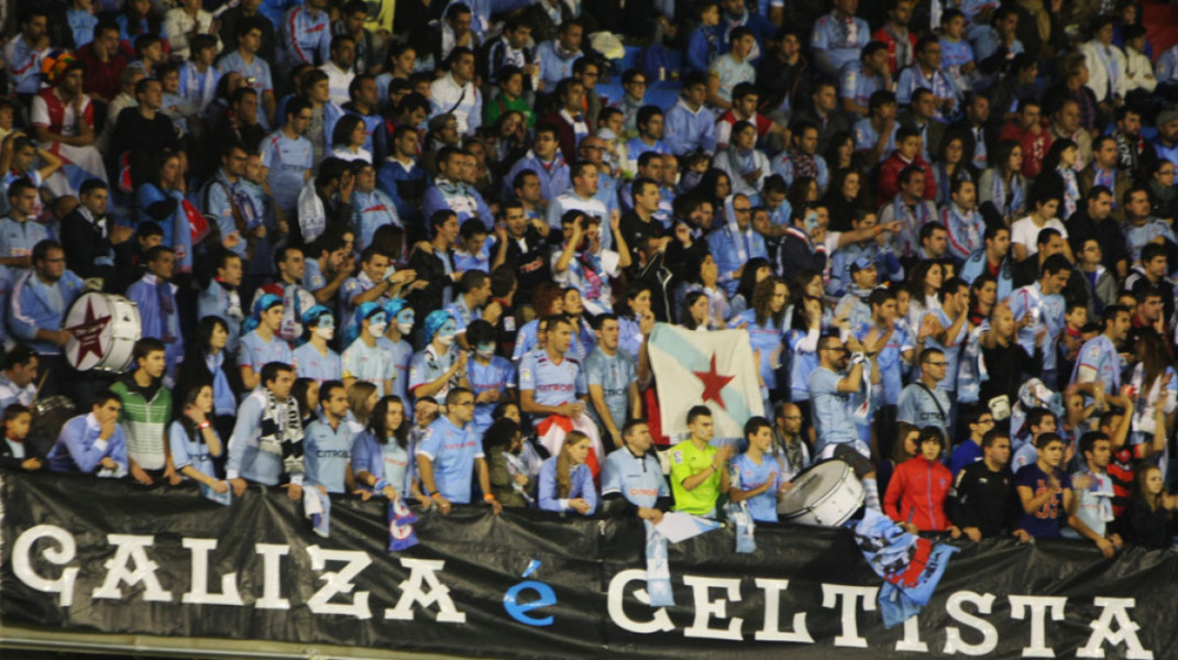 Seareiros do Celta no partido Celta-Dépor do 27 de outubro do 2012.